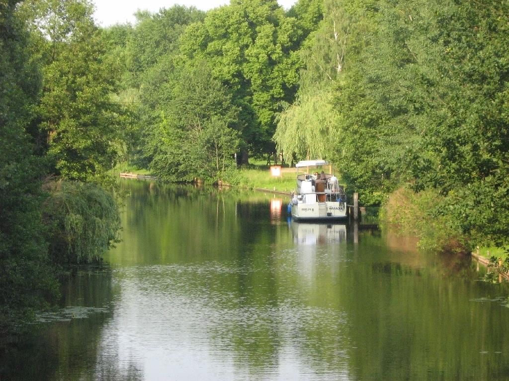 die Dahme nach Einmündung des Dahme-Umflutkanals, unterhalb von Märkisch Buchholz. Landkreis Dahme-Spreewald, Brandenburg (Germany)